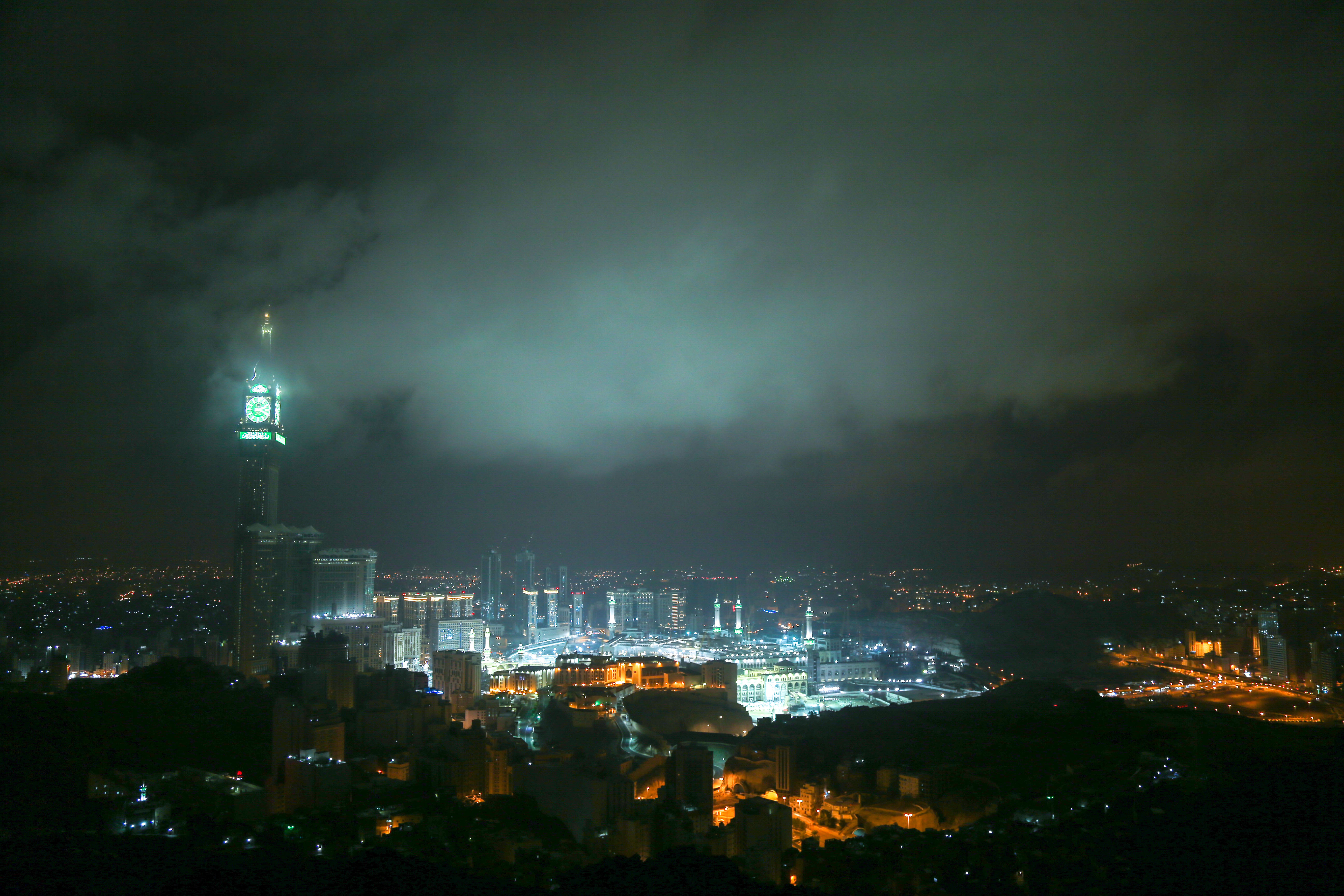 المسجد الحرام